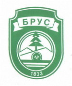 Blason de la ville de Brus en Serbie